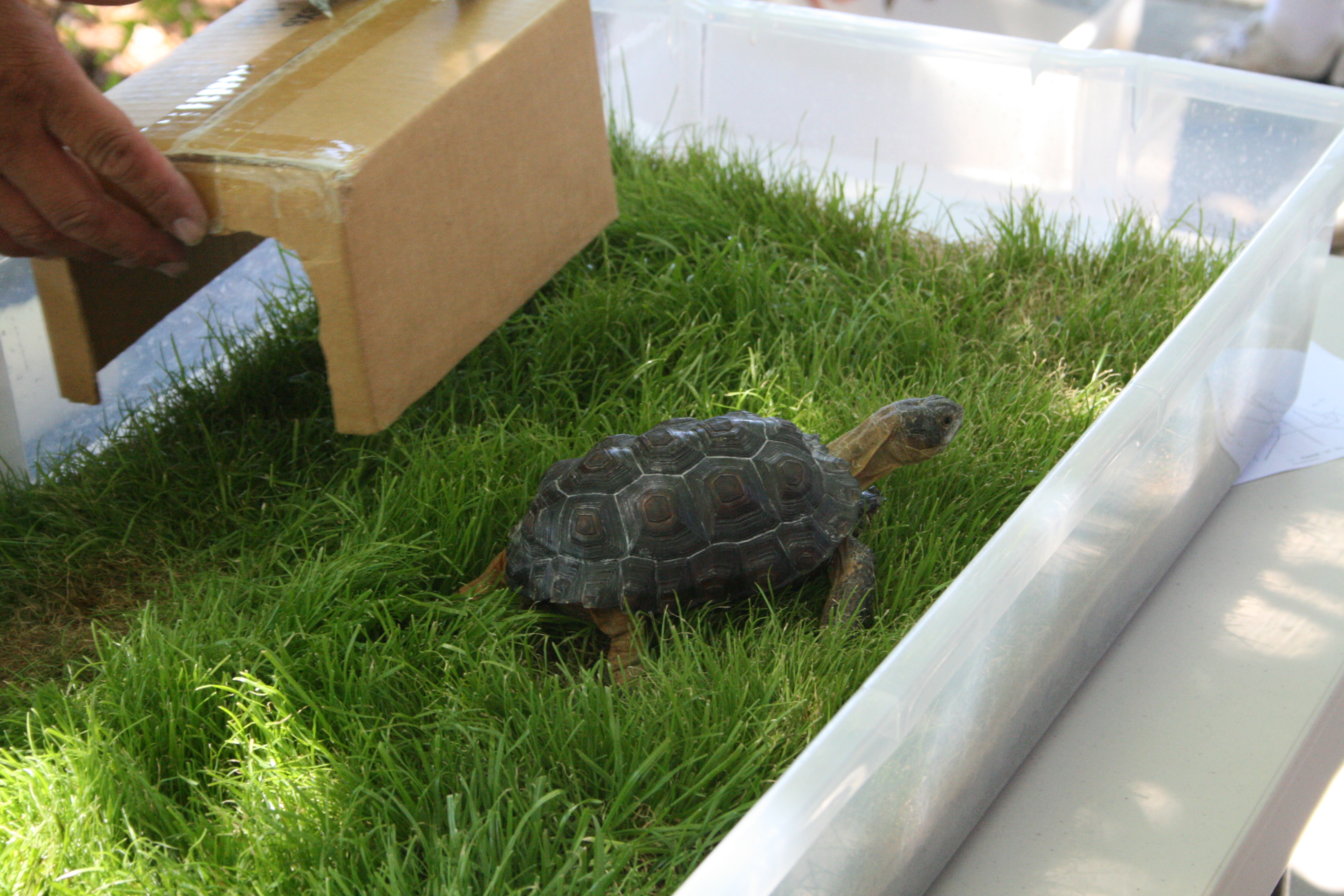 Box turtle (Terrapene)